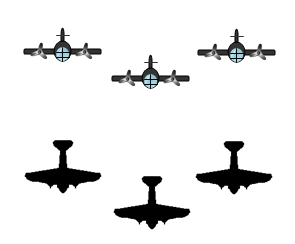 Flugformation Kettenkeil